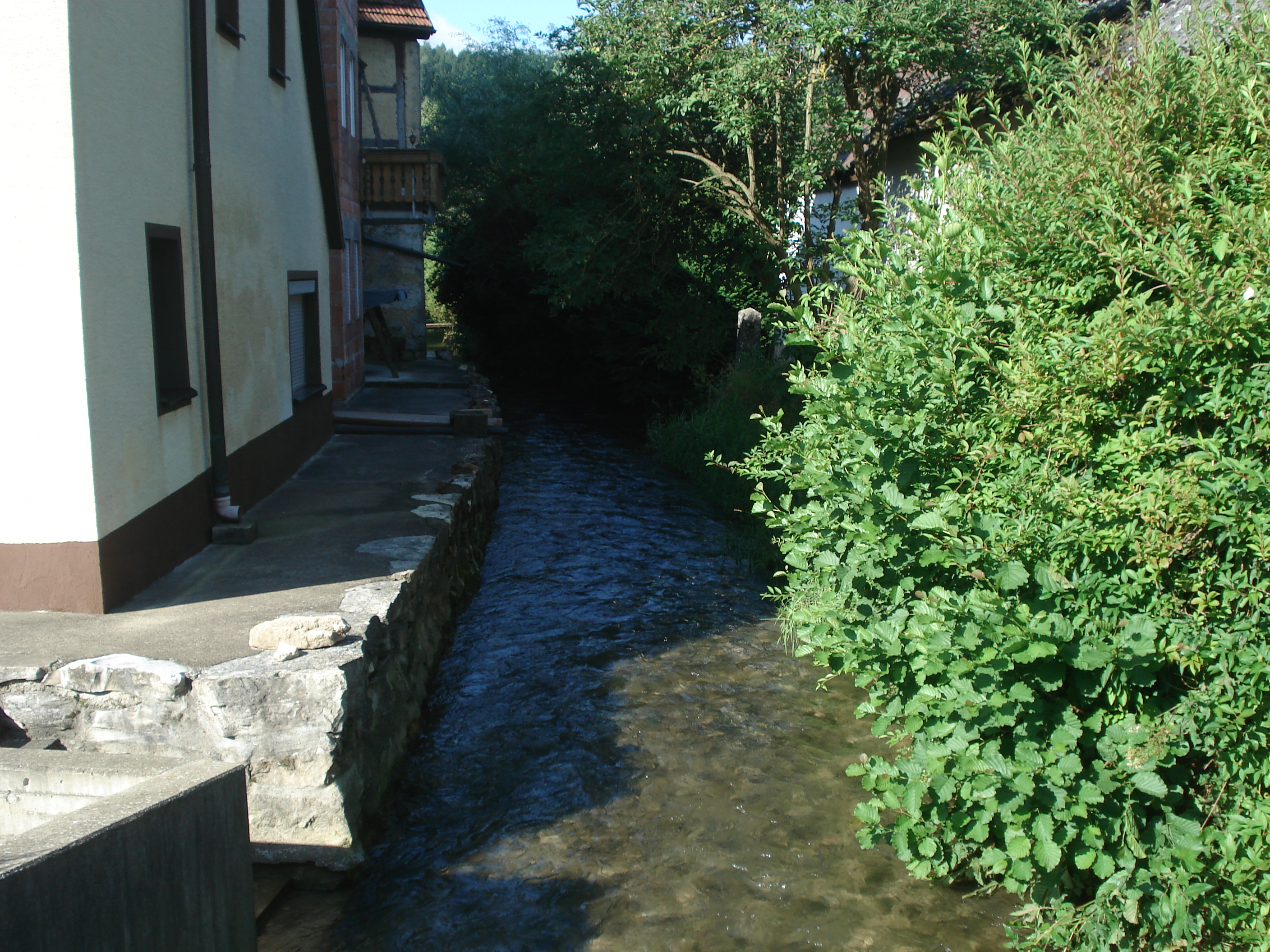 Der Thosbach in Wannbach